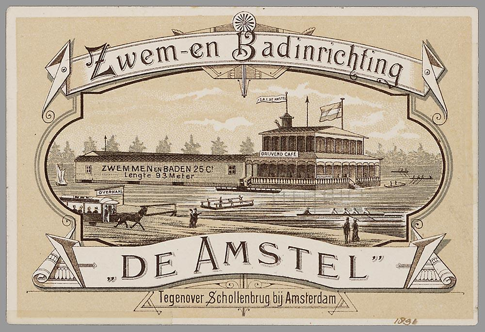 Klein drukwerk: Zwem- en Badinrichting "De Amstel".